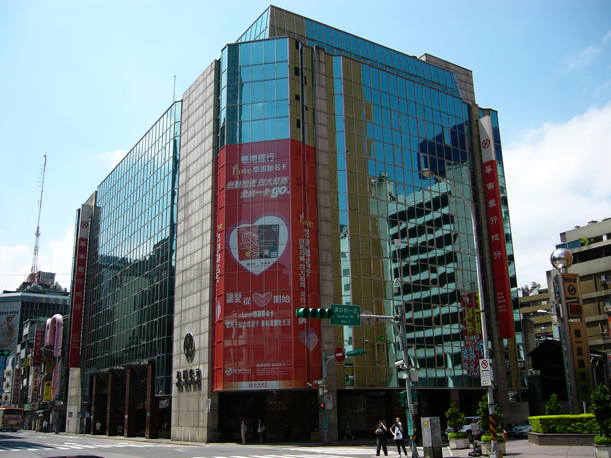 華南商業銀行總行，地址：臺北市中正區重慶南路一段38號。